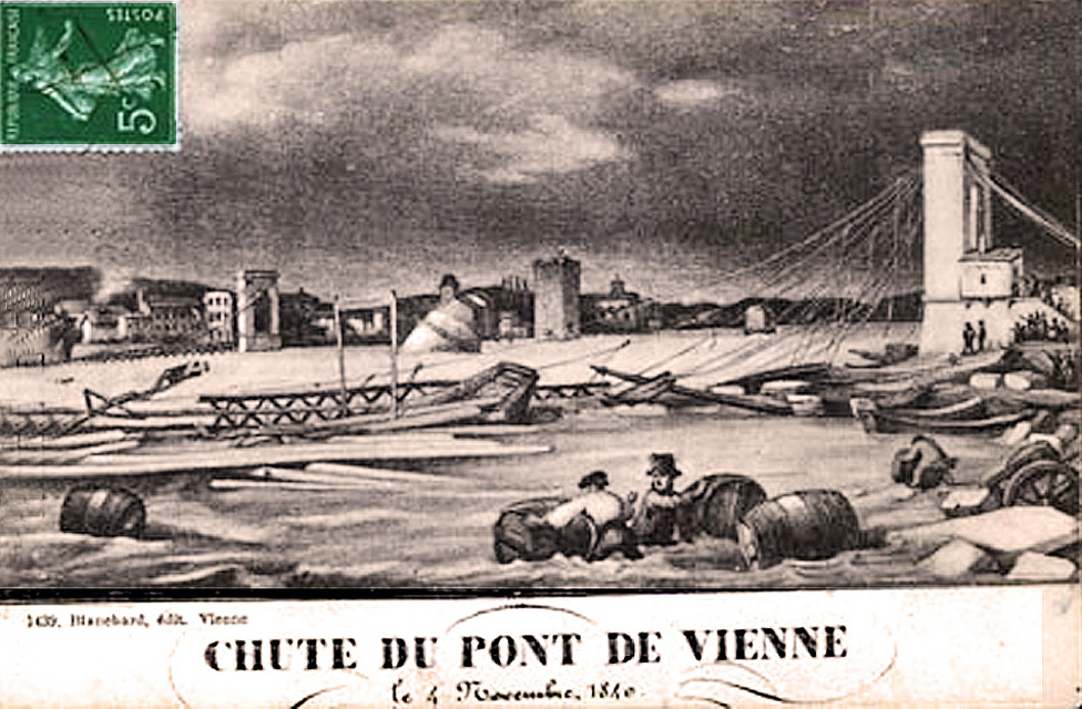 Chute du pont suspendu de Vienne (Isère), le 4 novembre 1840